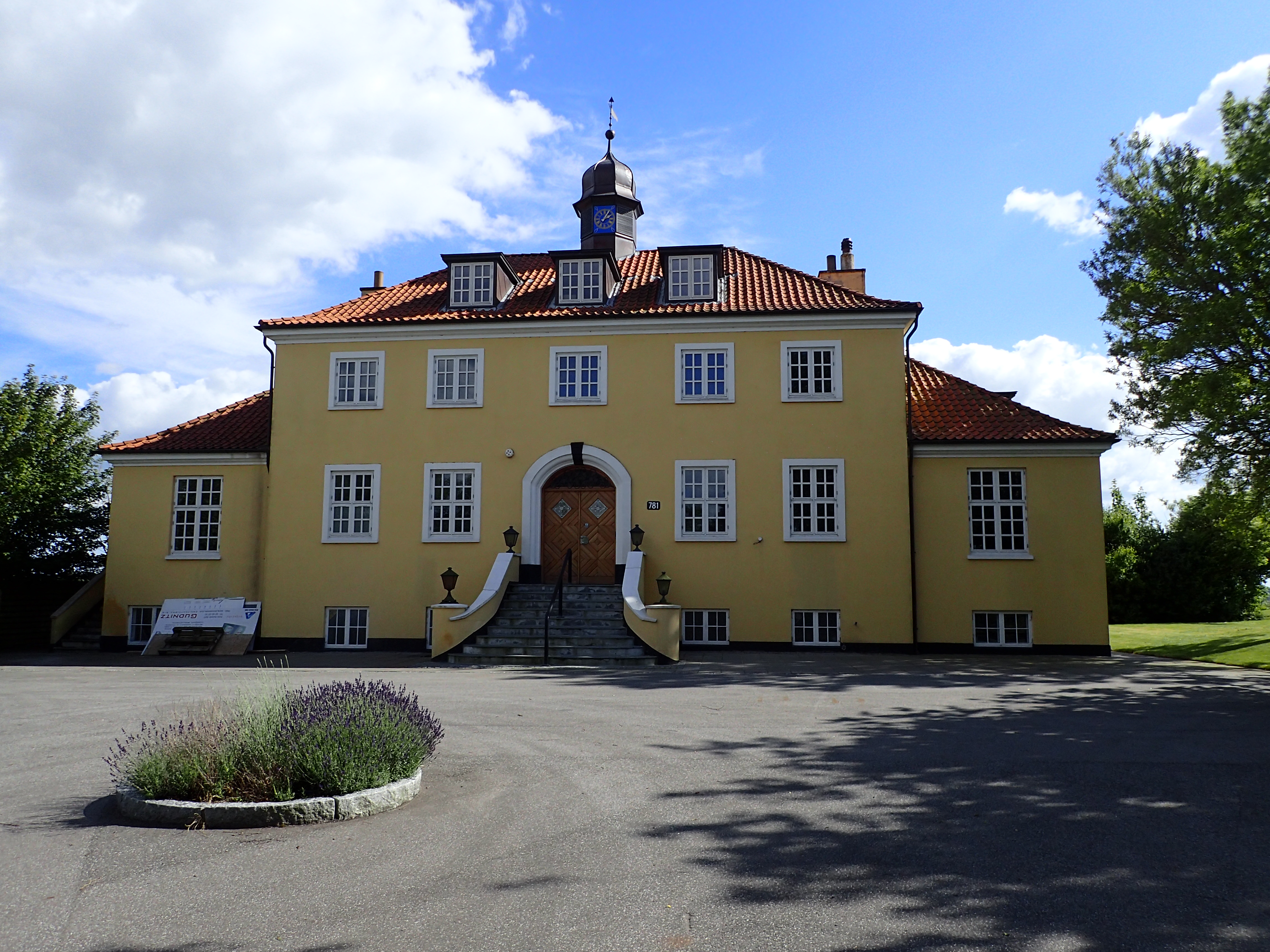 Hovedbygningen til Aarslev Højgaard. Bygget i 1943 af fabrikant Willy Johannsen.